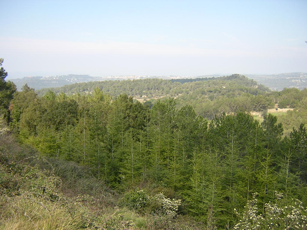 El Serrat de Mas Pujol des del Bosc